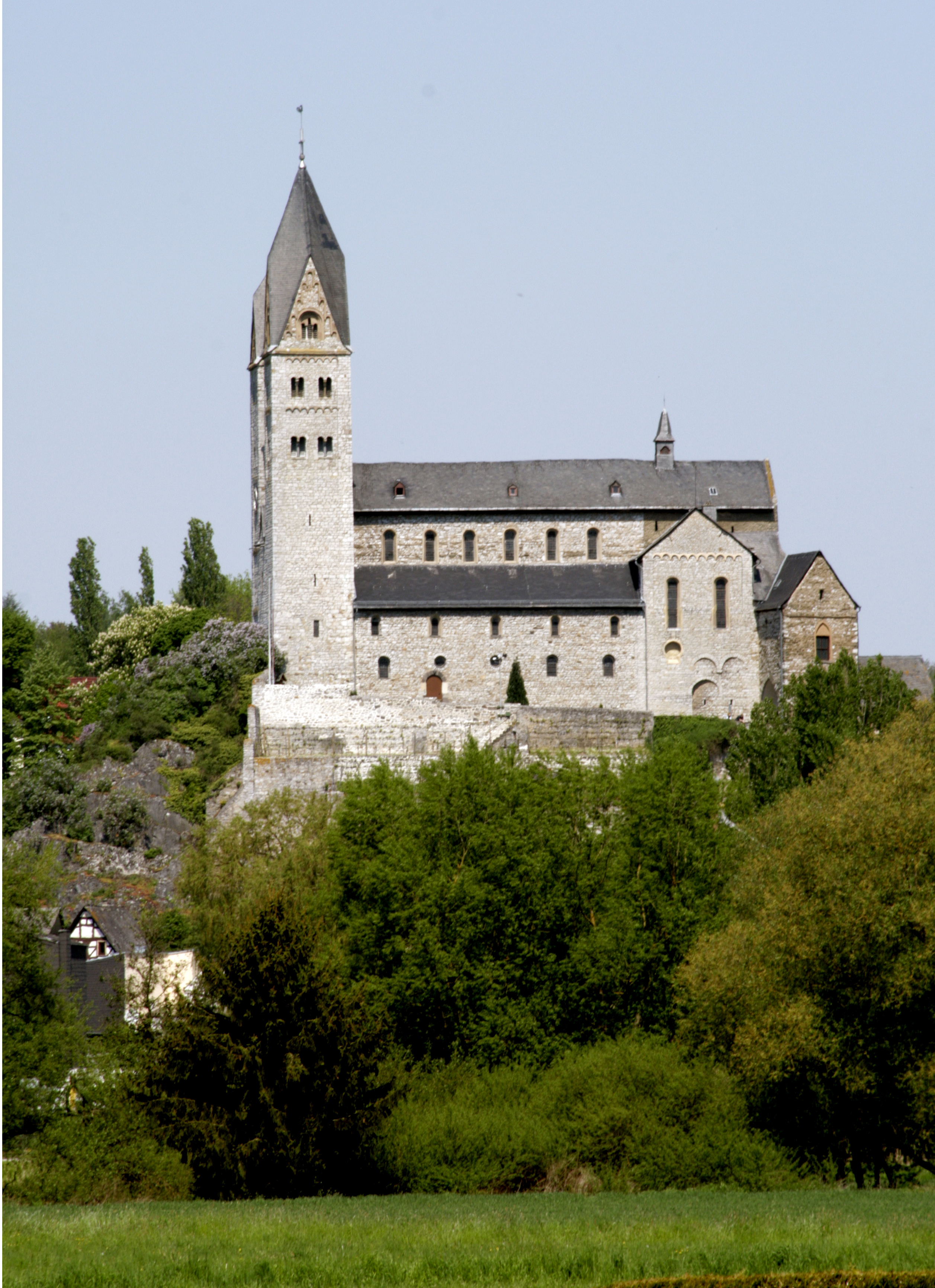 Lubentiusstift in Dietkirchen, Deutschland, von Westen aus gesehen